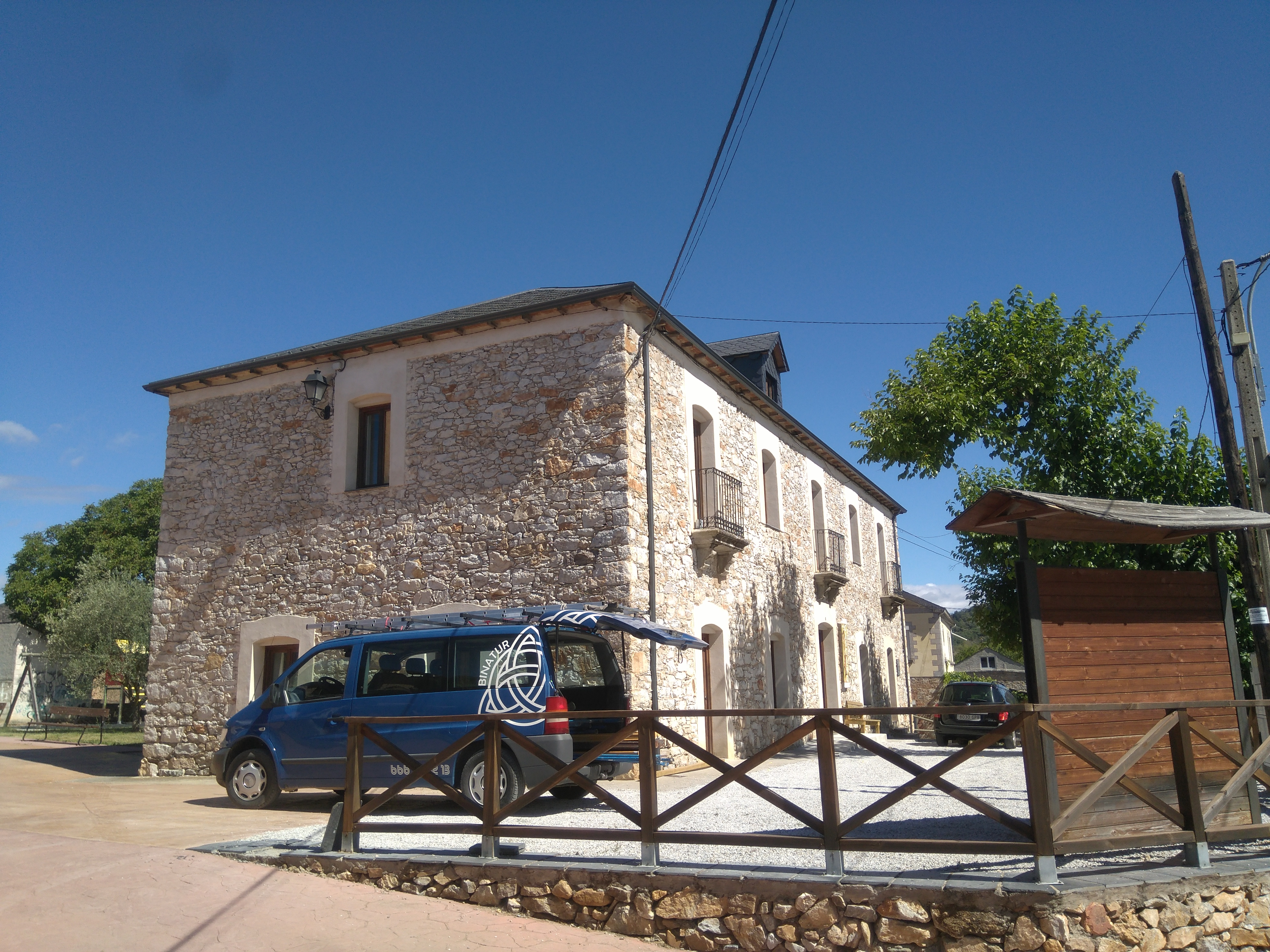 Centro de Interpretación del castaño en el municipio de Borrenes.